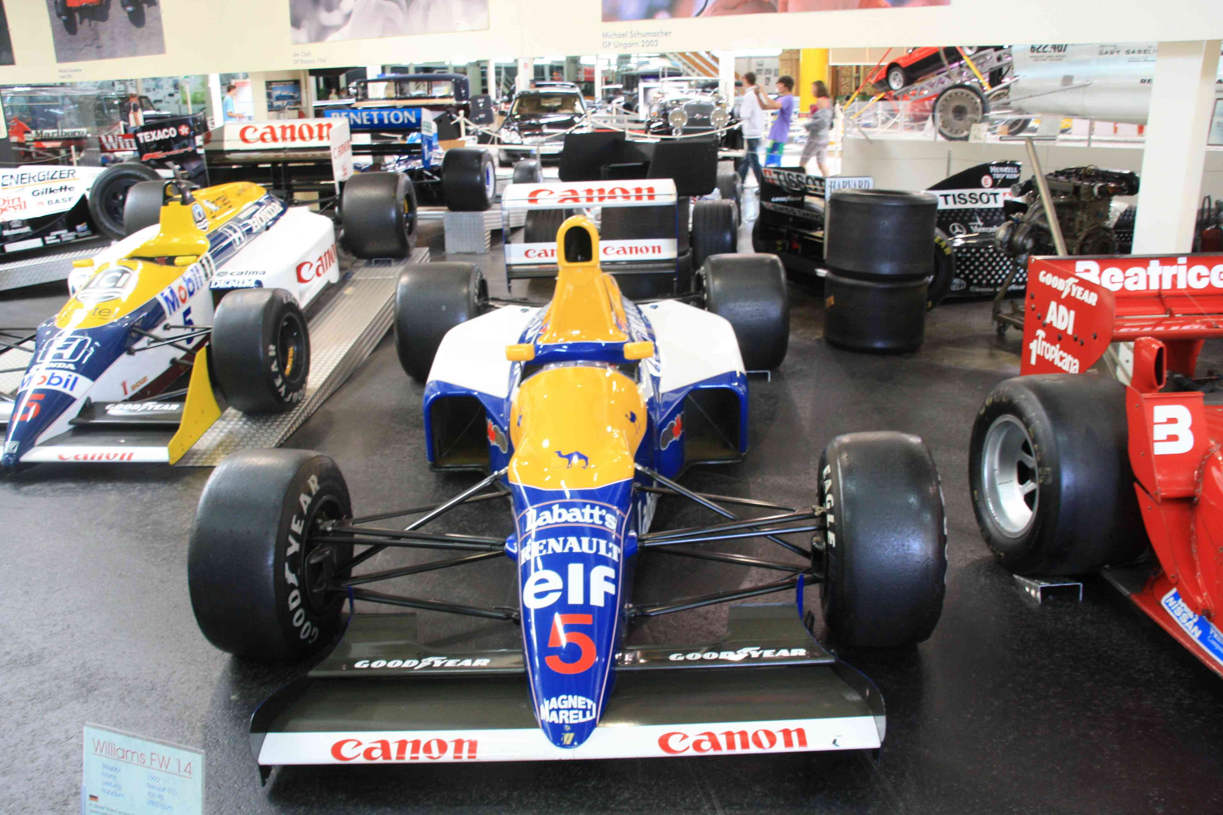 Williams FW 14 von Nigel Mansell